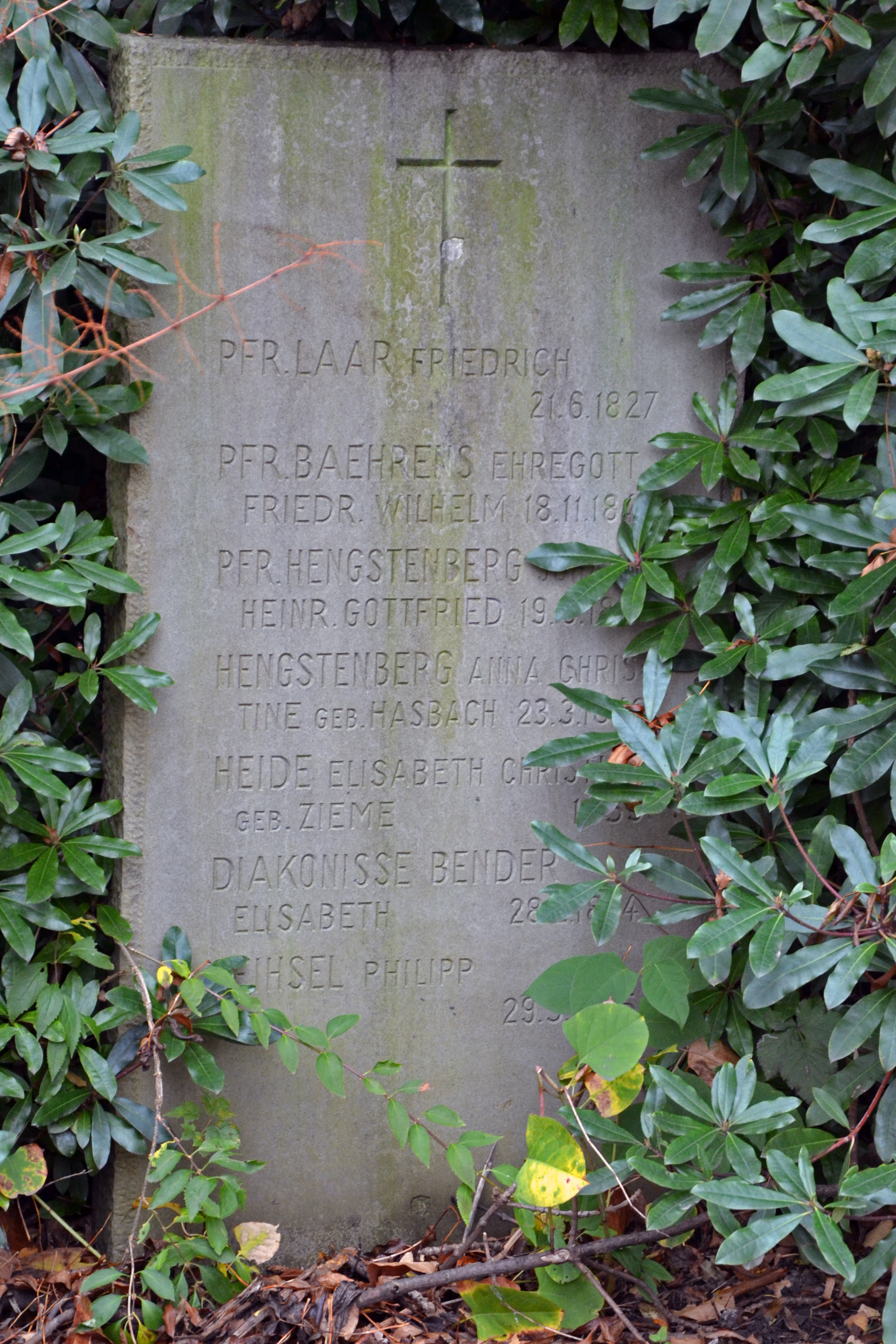 Ostfriedhof Essen: Erinnerungsstein an die katholische und evangelische Geistlichkeit, die beiderseits des Eingangstores des ehemaligen Friedhofes am Kettwiger Tor lag.